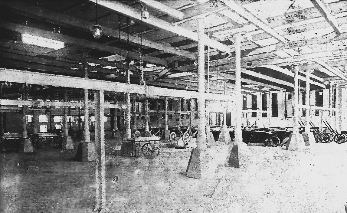 Auskühlhalle des Seegrenzschlachthofes in Lübeck.